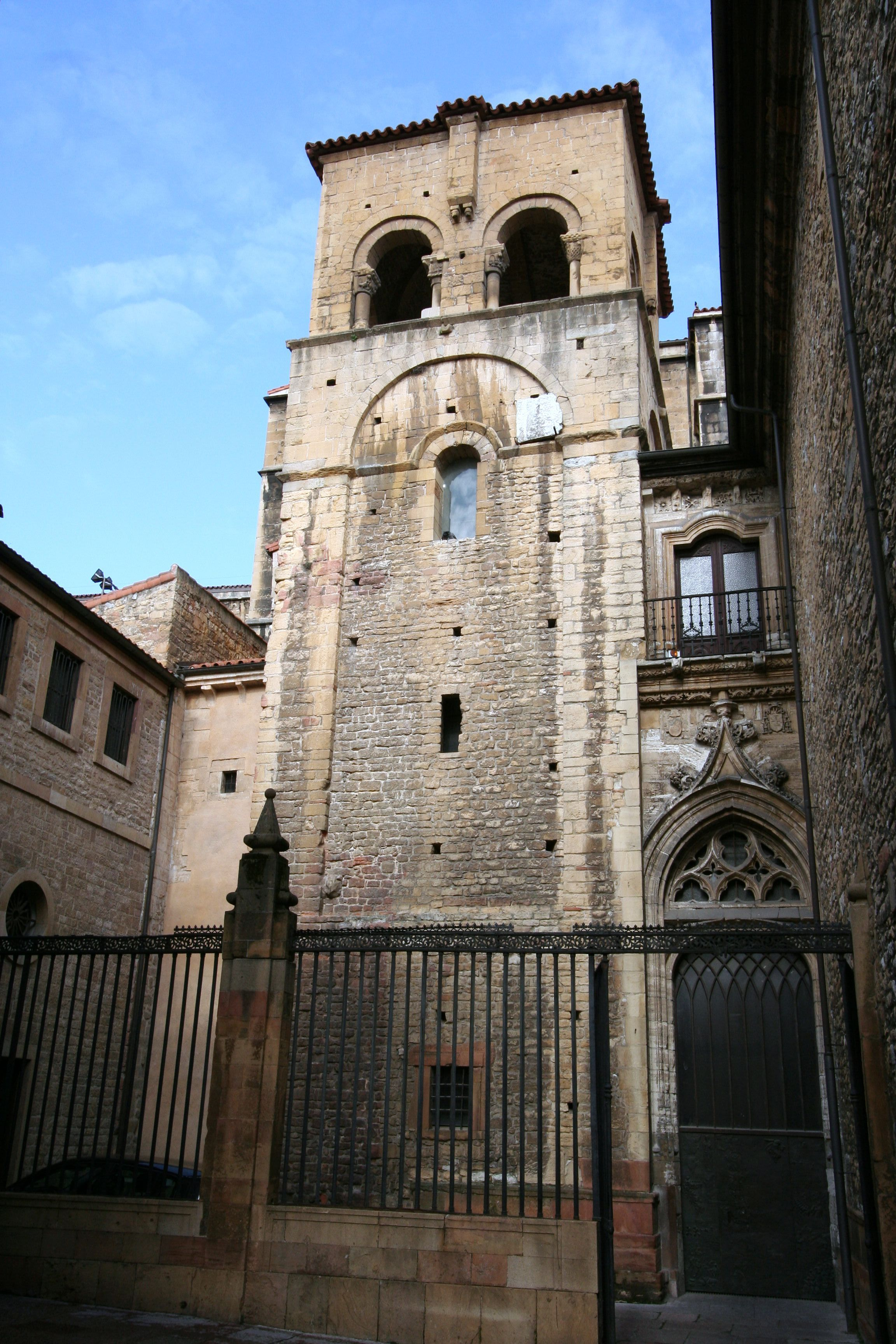 Torre vieja san salvador